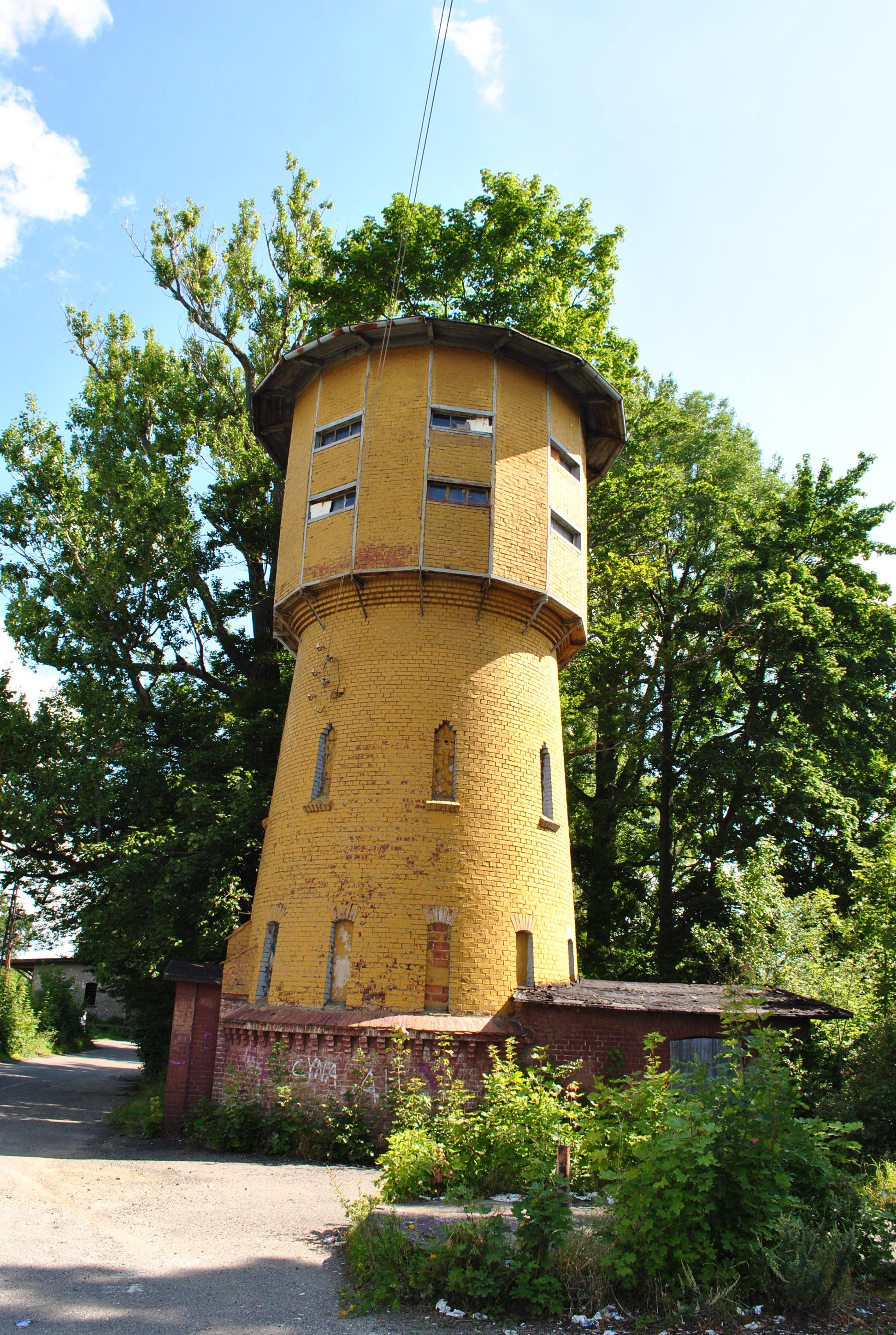 Wieża wodna w Mirsku.